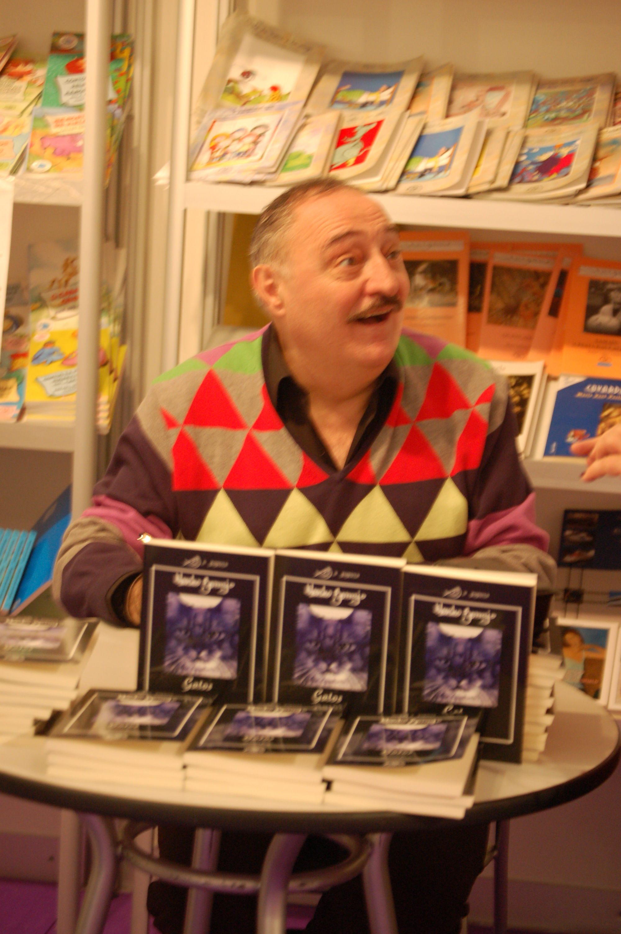 Moncho Borrajo firmando su ultimo libro